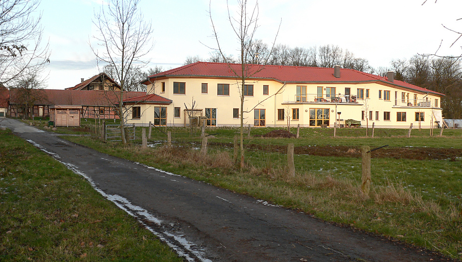 Adolphshof